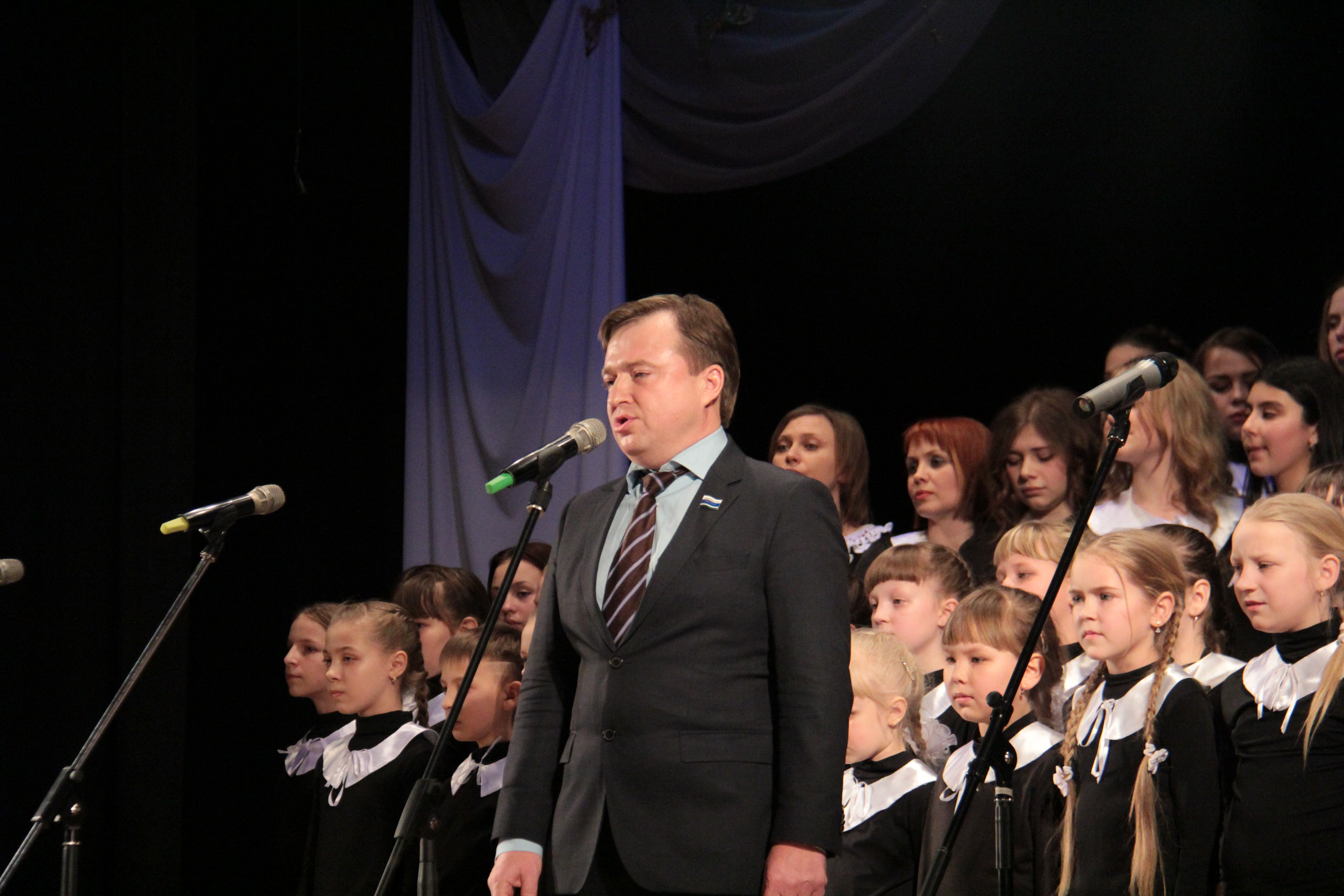 Выступление на фестивале "Битва Хоров", Камышлов, 2016 год.